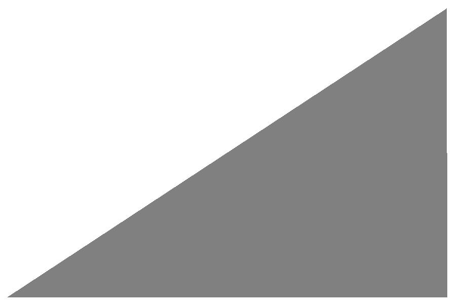 Bild på ett lutande plan. Jag har själv gjort bilden 27/8 - 2006